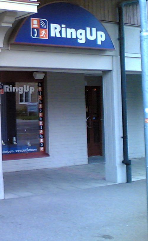 byggnad